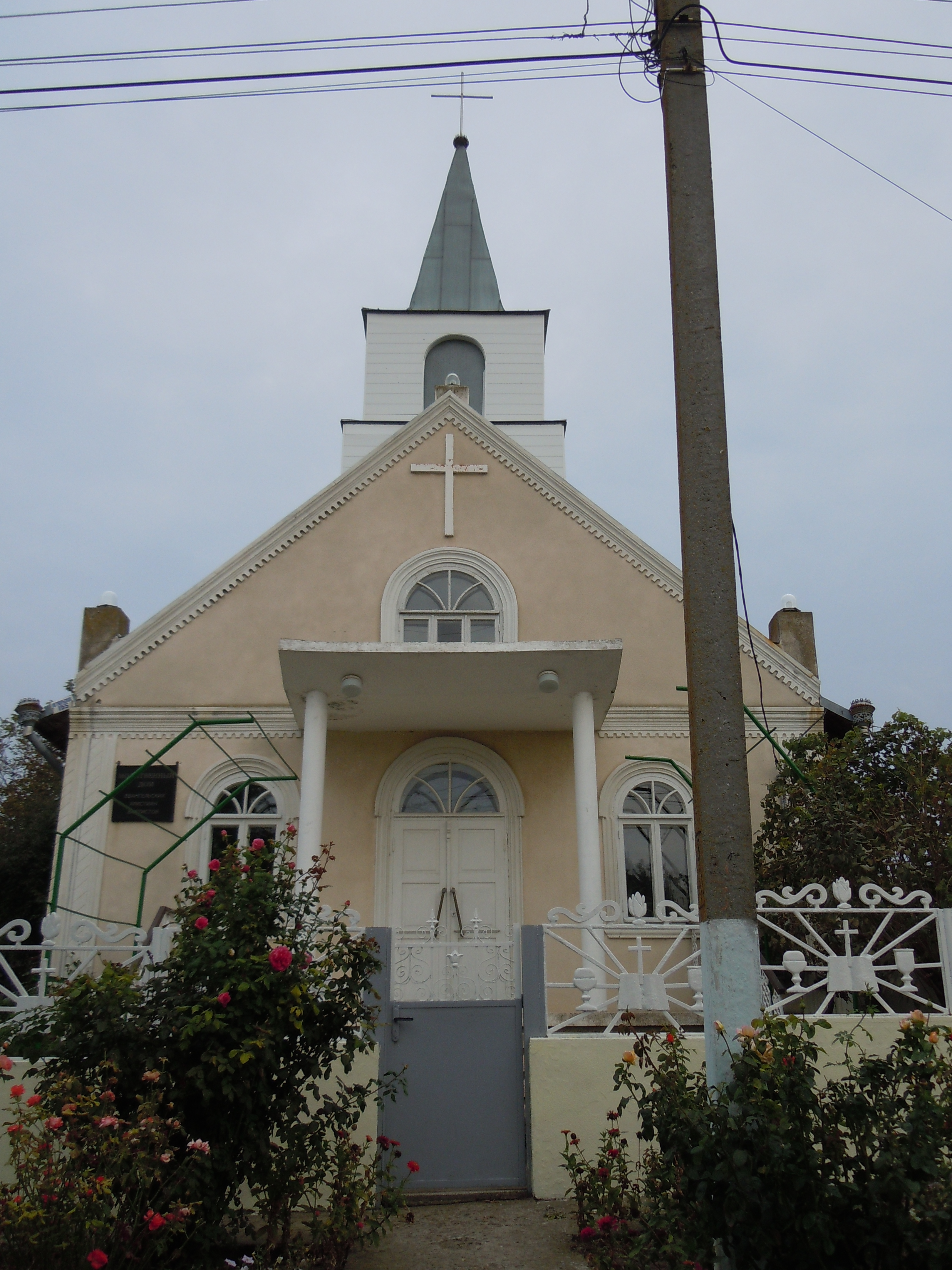 Баптистська церква в селі Зоря, Саратський район, Одеська область